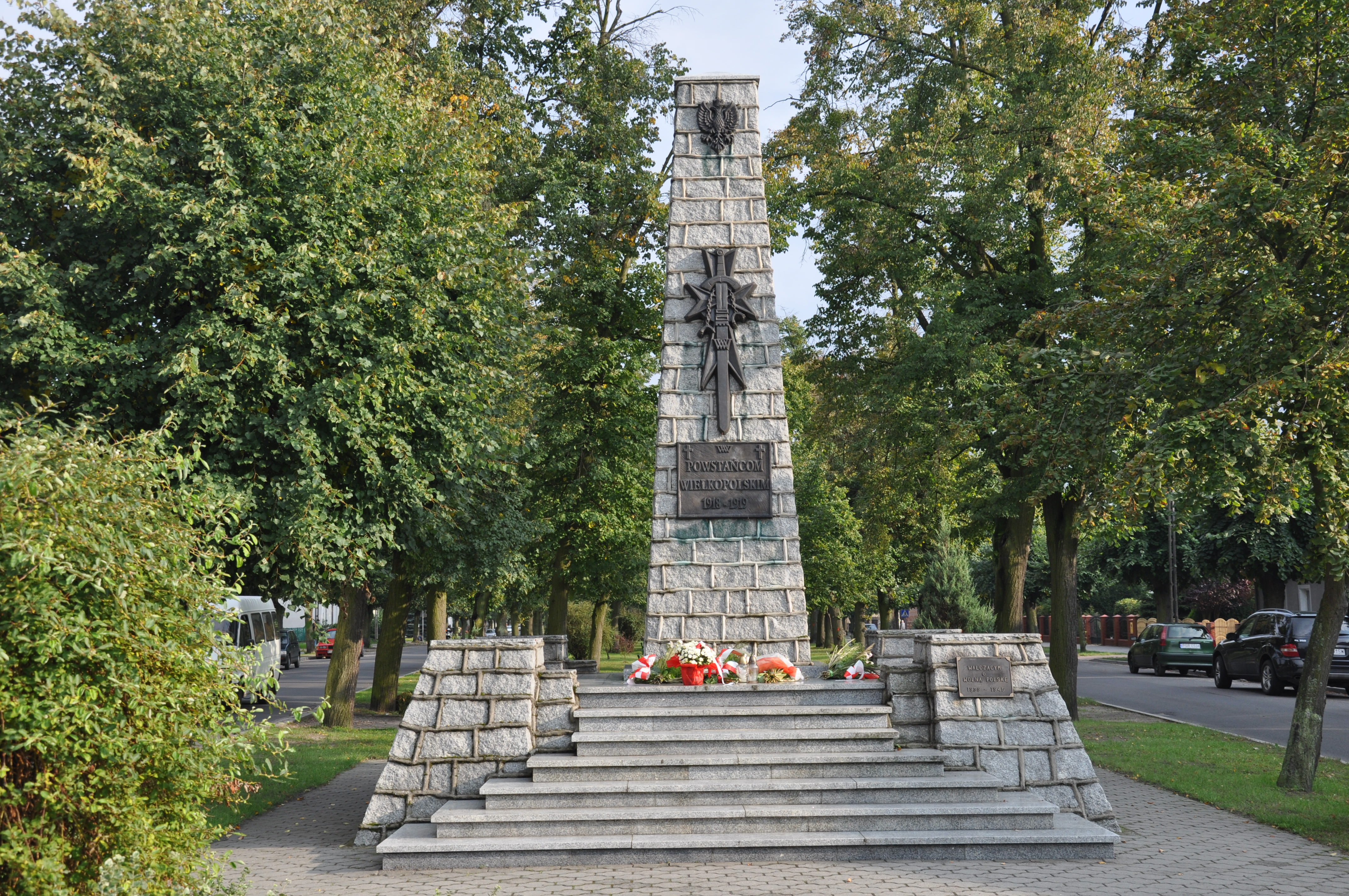 Pomnik powstańców wielkopolskich w Zaniemyślu